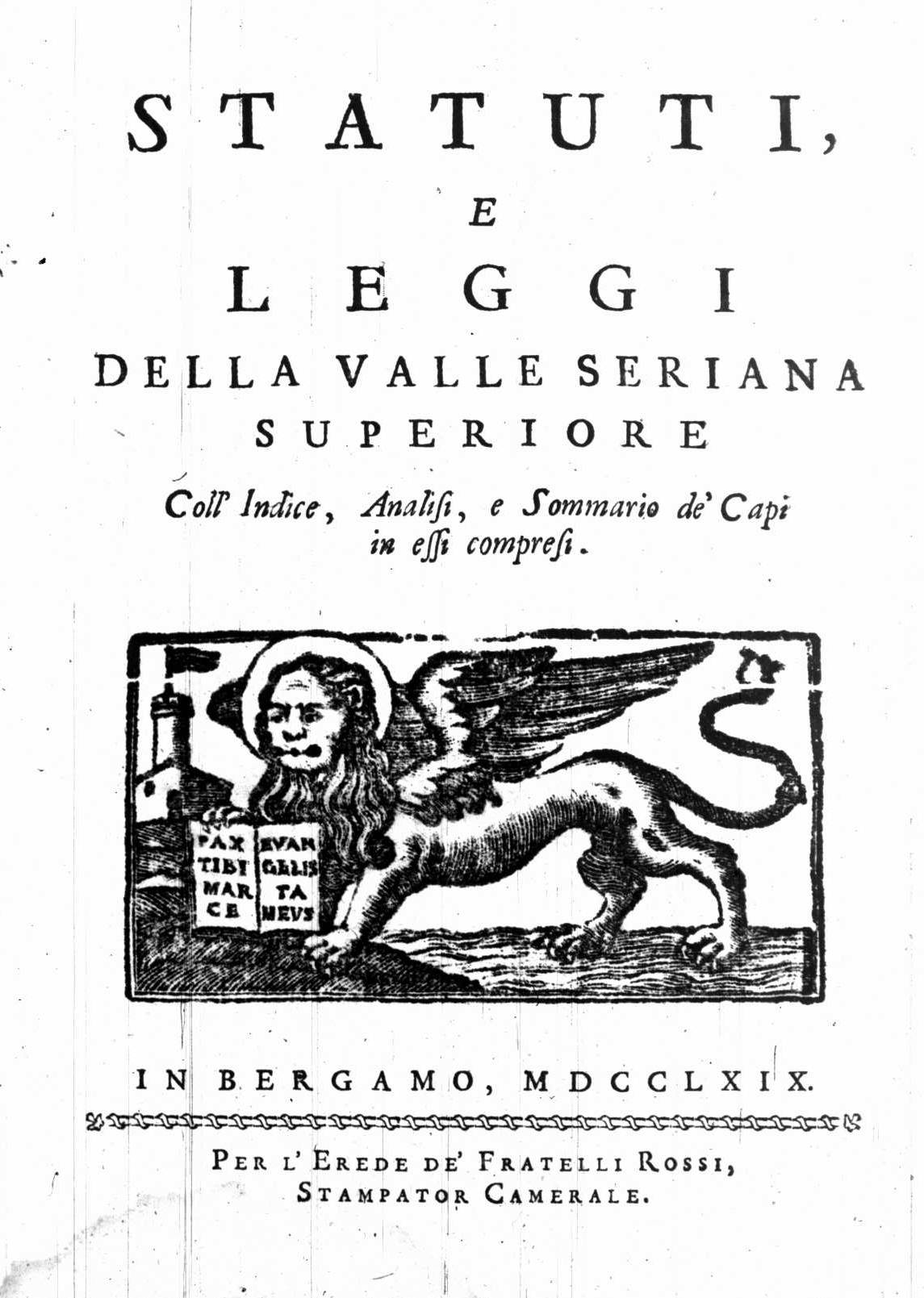 Frontespizio